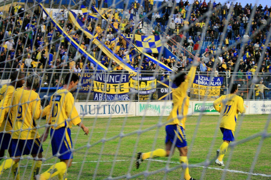 Jugadores del EC Pelotas celebrando un gol ante el Brasil de Farroupilha